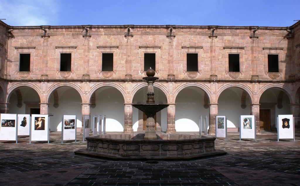 El Centro Cultural Clavijero se ubica en la ciudad de Morelia, Michoacán, México, es un centro cultural público dedicado albergar exposiciones temporales de instituciones culturales públicas y privadas. El recinto tiene su sede en lo que fue el antiguo Colegio de la Compañía de Jesús, de estilo barroco del siglo XVIII.